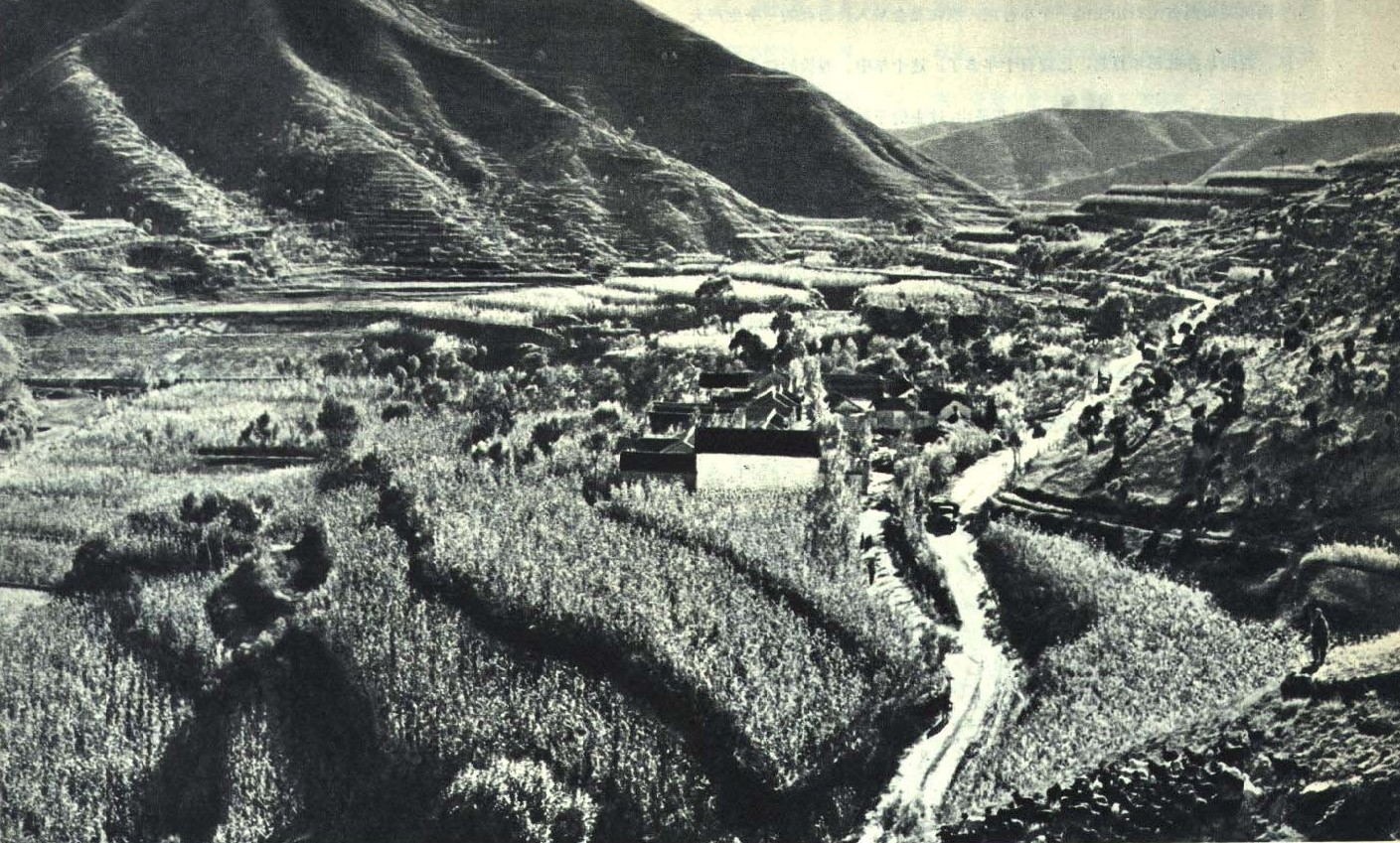 1963-04 1963年 山西平顺县金星人民公社